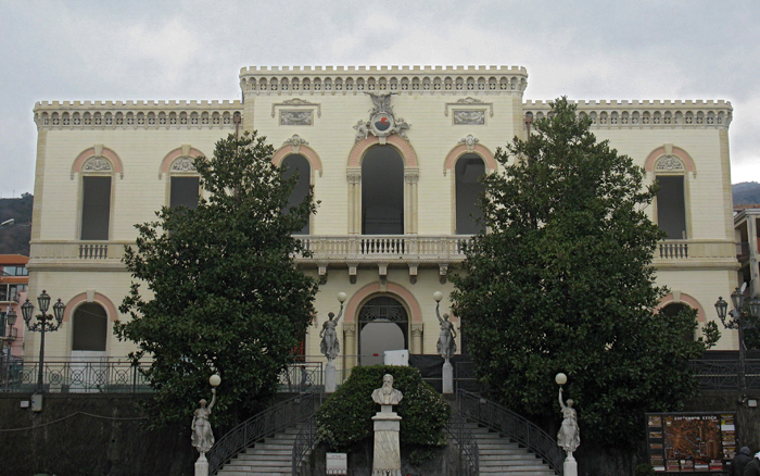 Palazzo Municipale di Zafferana Etnea (CT), in fase conclusiva di restauro (marzo 2009) - Foto D. Pennisi.